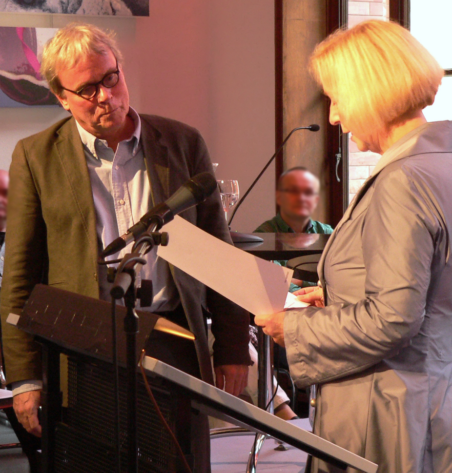 Peter Waterhouse Verleihung Nicolas-Born-Preis 2011